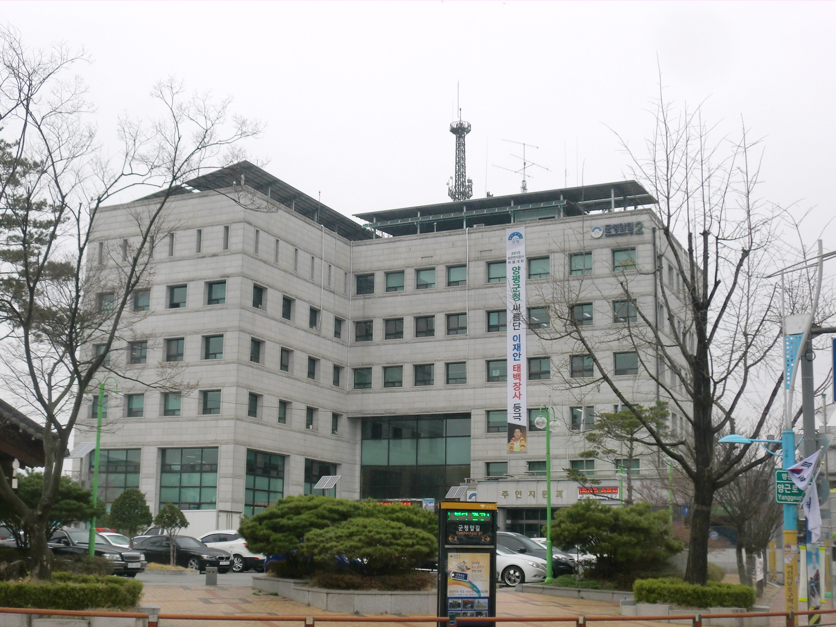 경기도 양평군에 있는 양평군청